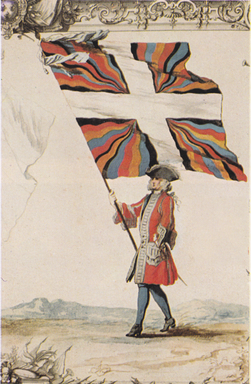 Fähnrich des Schweizer Garderegiments in französischen Diensten mit Ordonnanzfahne. Gouache.